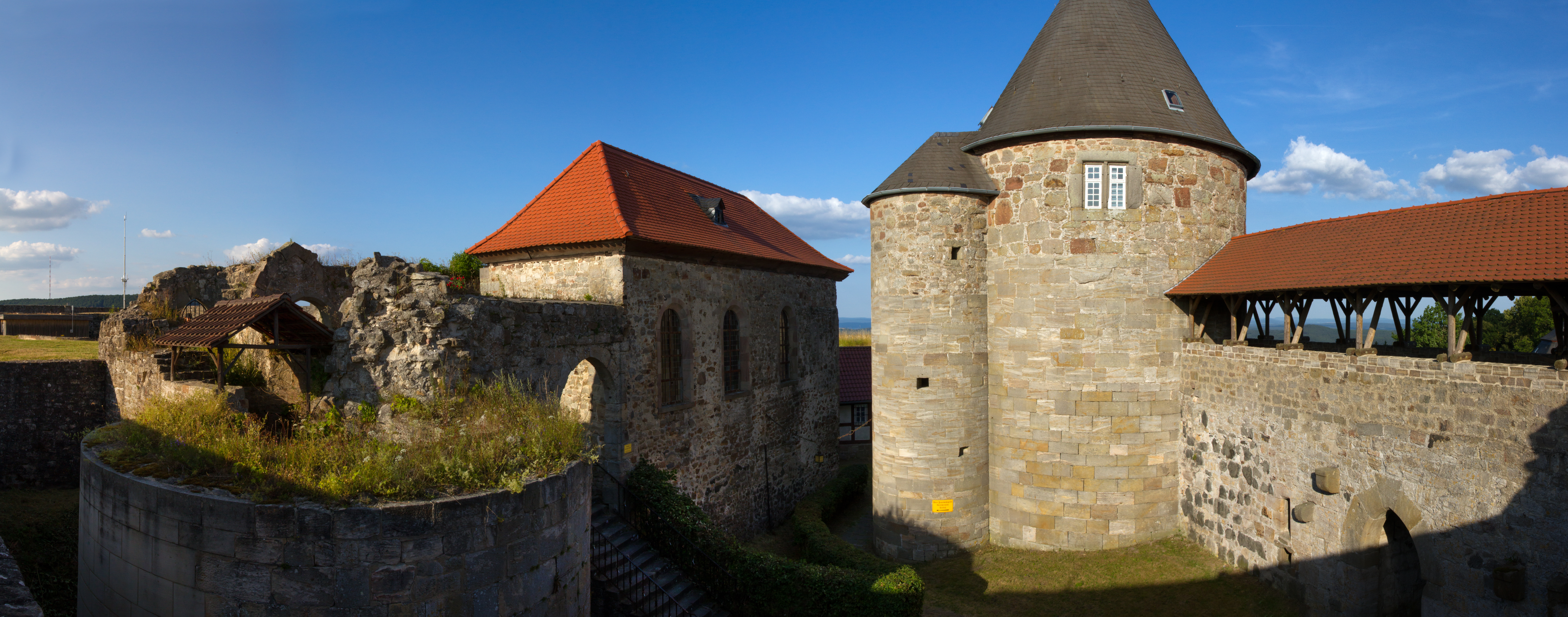 (LSG:HE-2632024)_Burg Herzberg